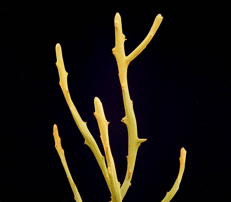 Euphorbia imerina